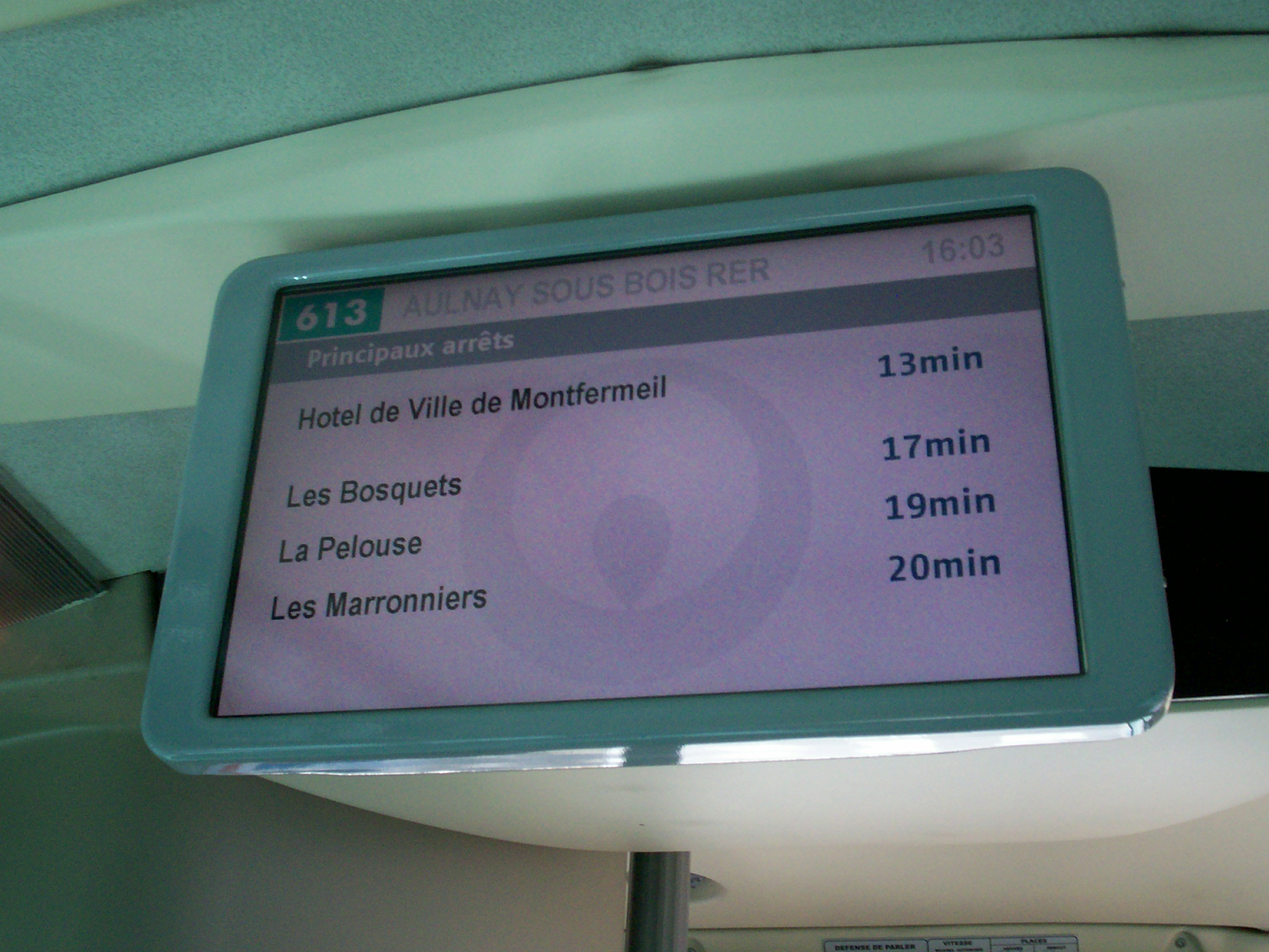 Système d'information voyageurs embarqué de Veolia Transport sur la ligne 613